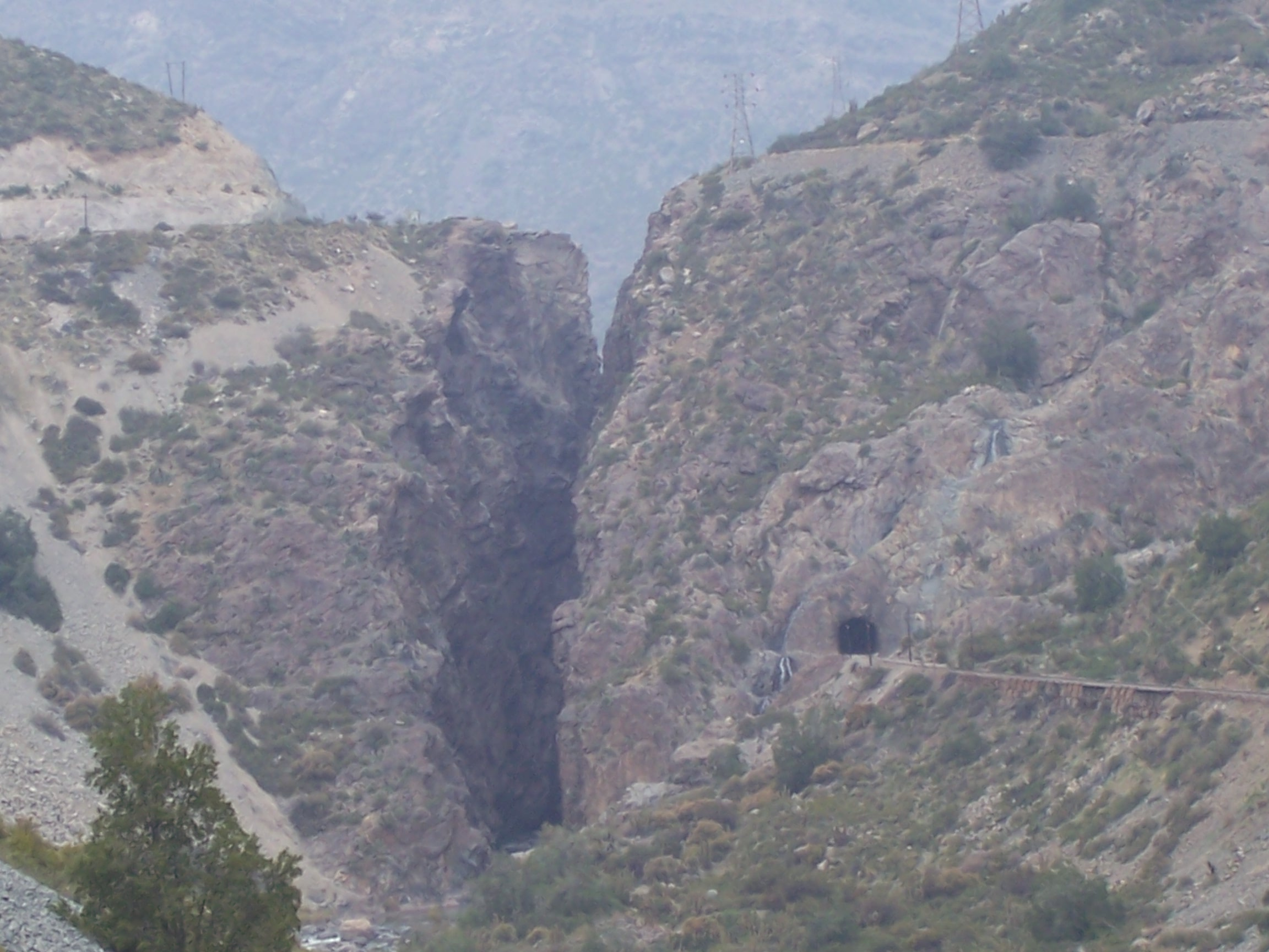 La erosión aumenta la distancia.